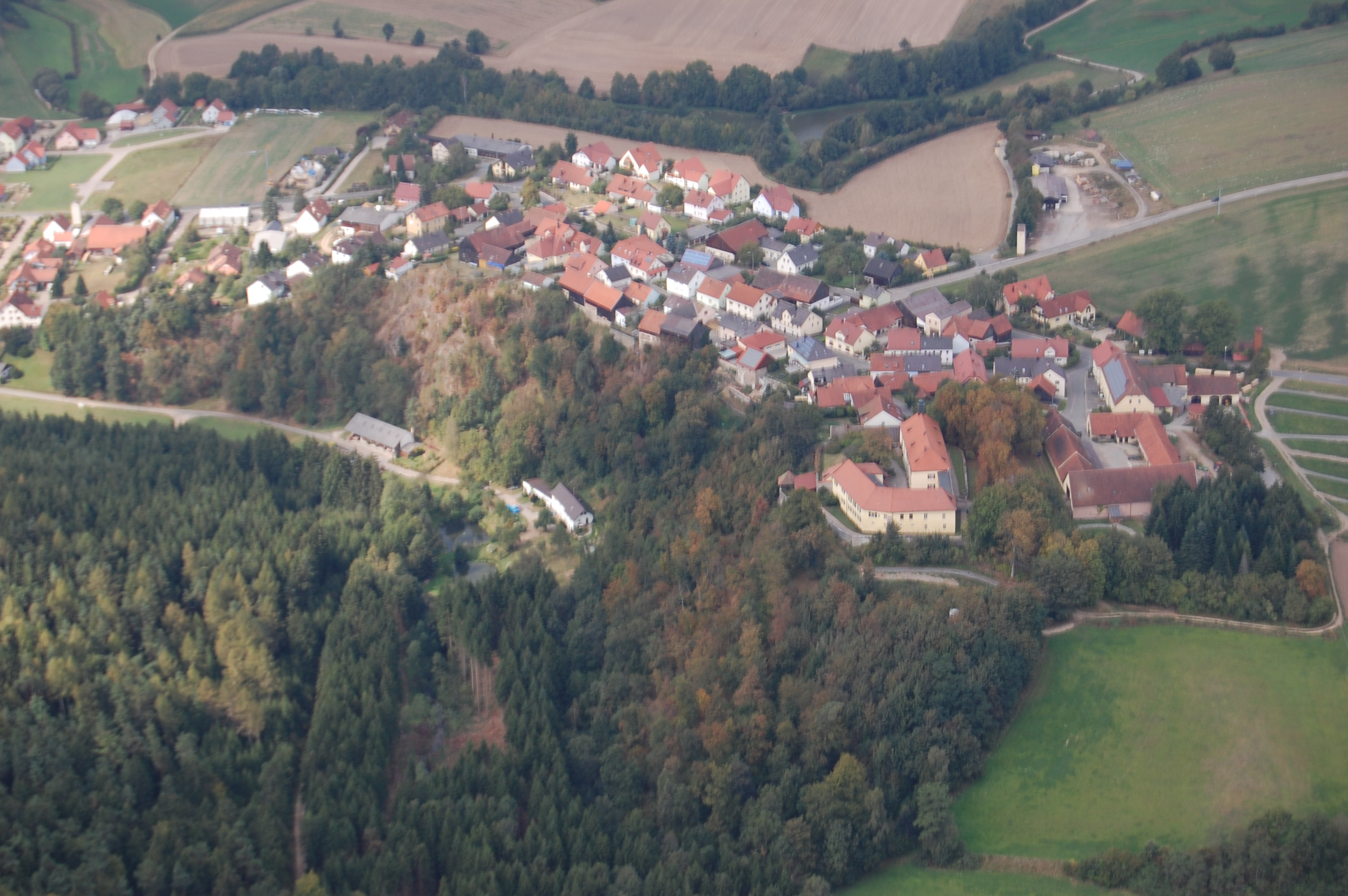 Guteneck mit Schloss Guteneck, auf dem an jedem der Adventswochenenden ein historisch-romantischer Weihnachtsmarkt stattfindet.